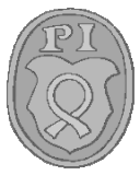 Juustenin sinetti